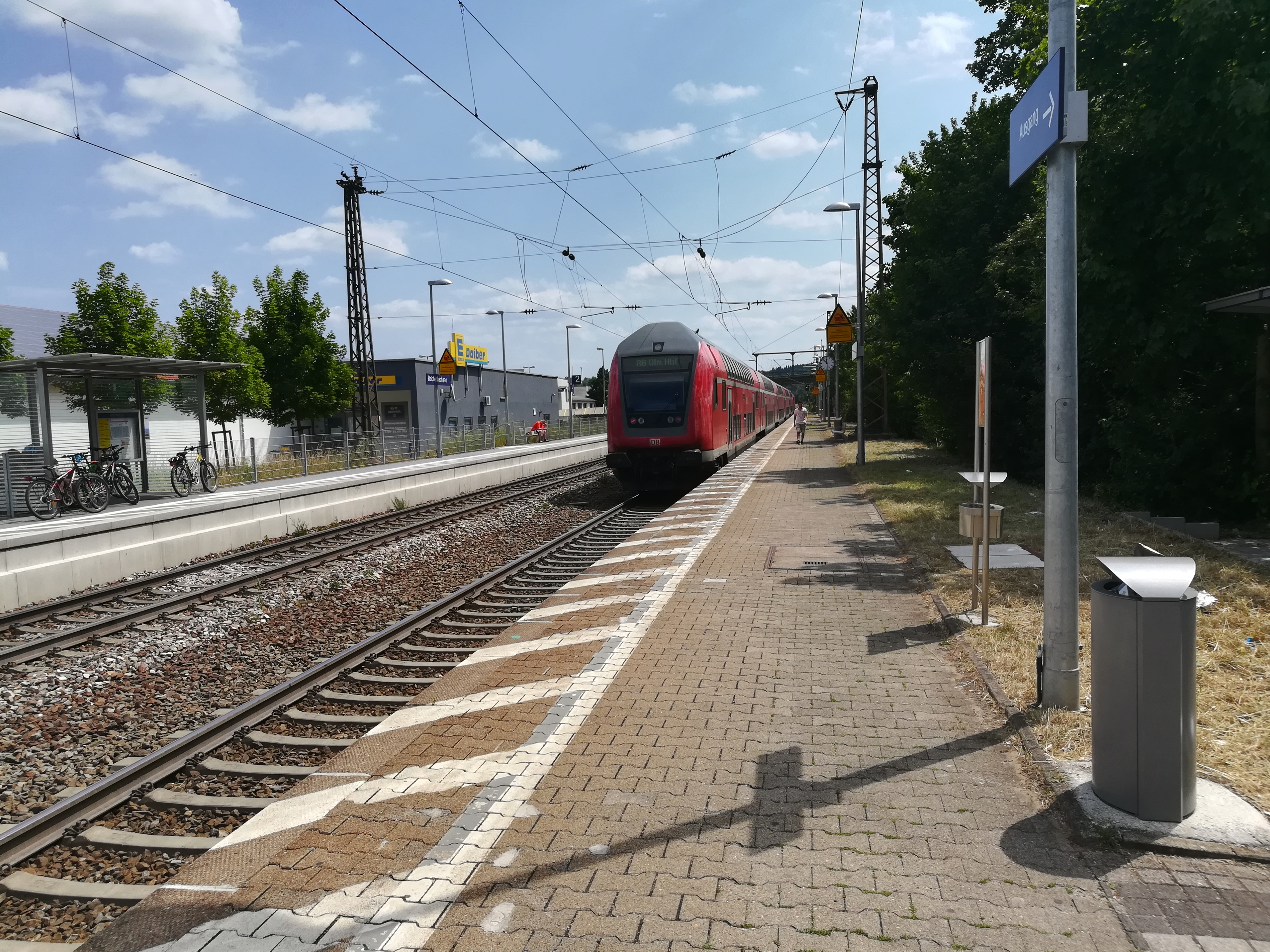 Der Bahnhof Reichenbach (Fils)